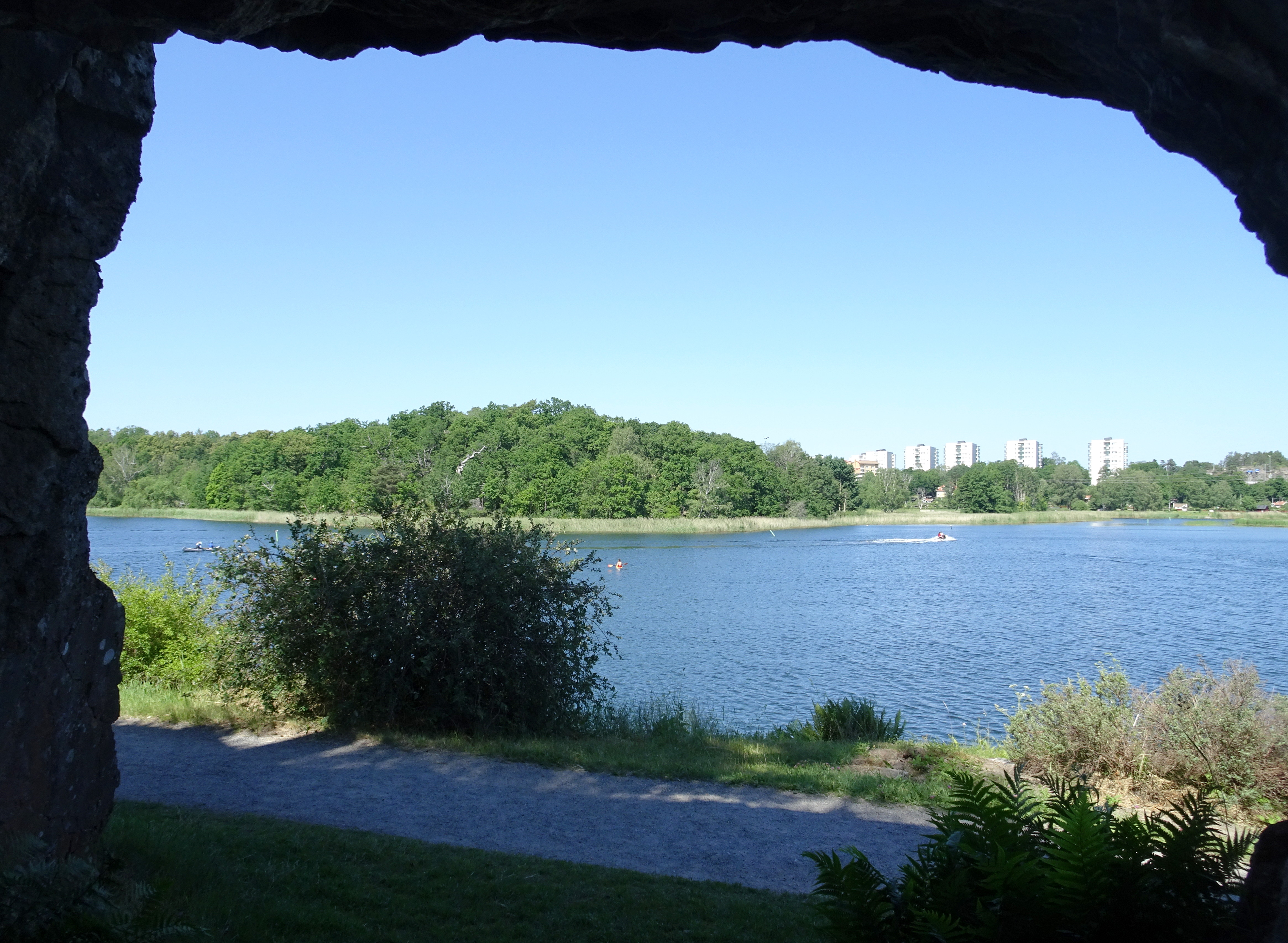 Tivoliudden sedd från grottan i Bergianska Trädgården